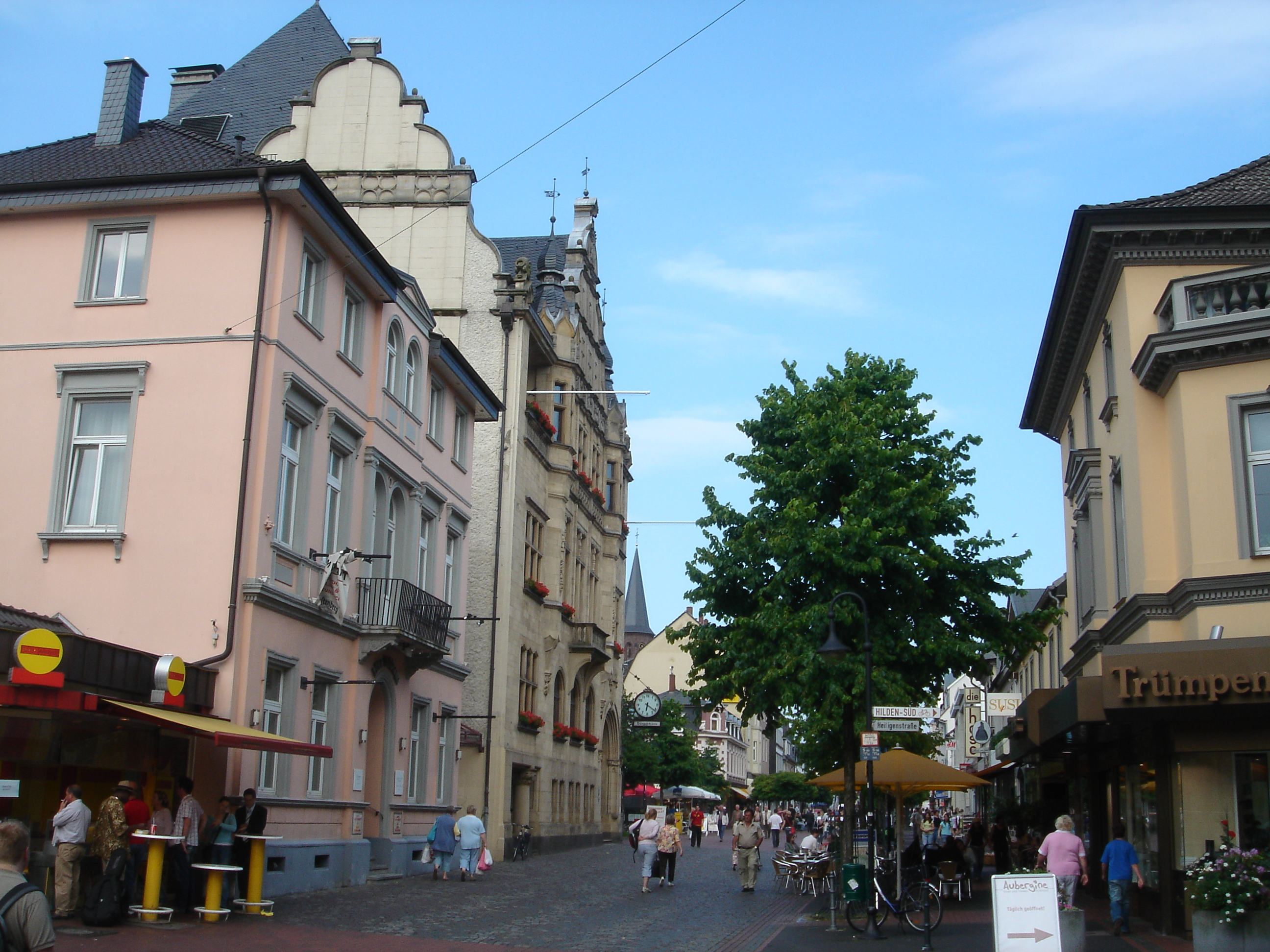 Summary Die Mittelstraße in Hilden. Links das Bürgerhaus, ehemals Rathaus, und das alte Meldeamt. Selbst fotografiert von Benutzer:Bordeaux im Juni 06. Licensing